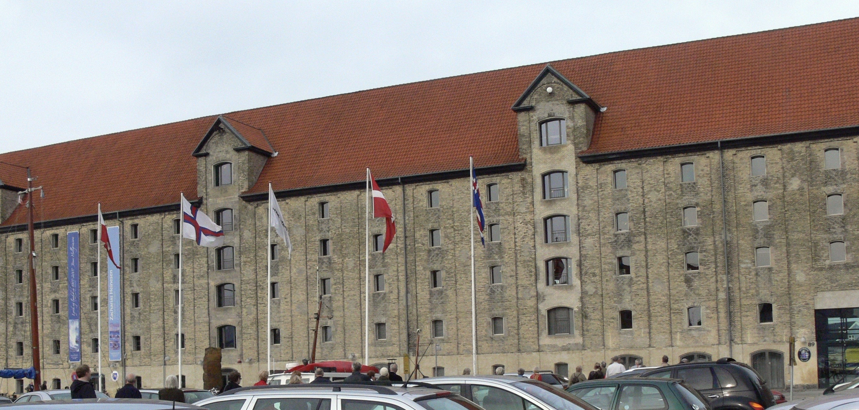 Nordisches Kulturzentrum in Kopenhagen.